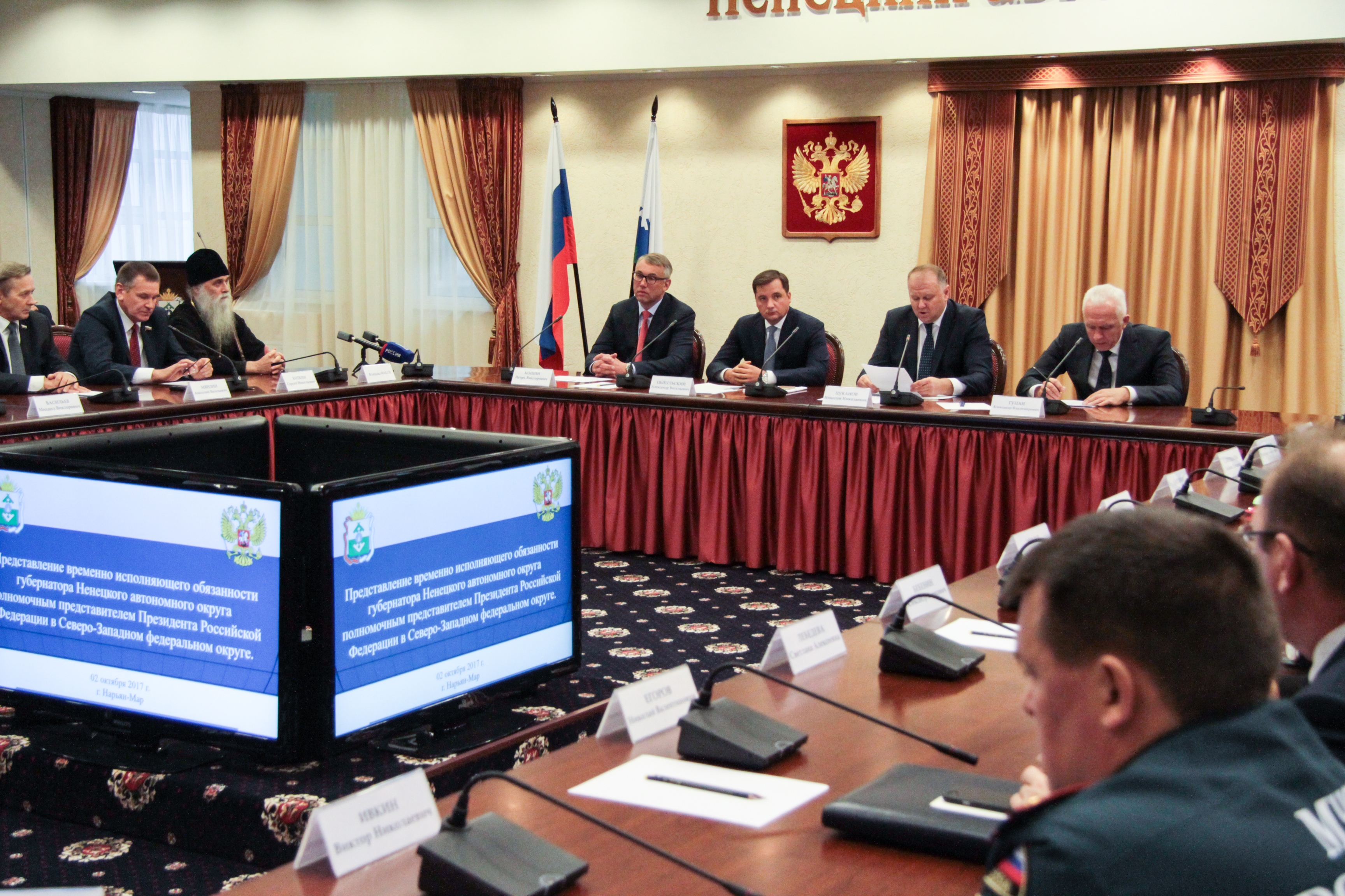 ПОЛПРЕД ПРЕЗИДЕНТА ПРЕДСТАВИЛ ВРИО ГУБЕРНАТОРА НАО АЛЕКСАНДРА ЦЫБУЛЬСКОГО